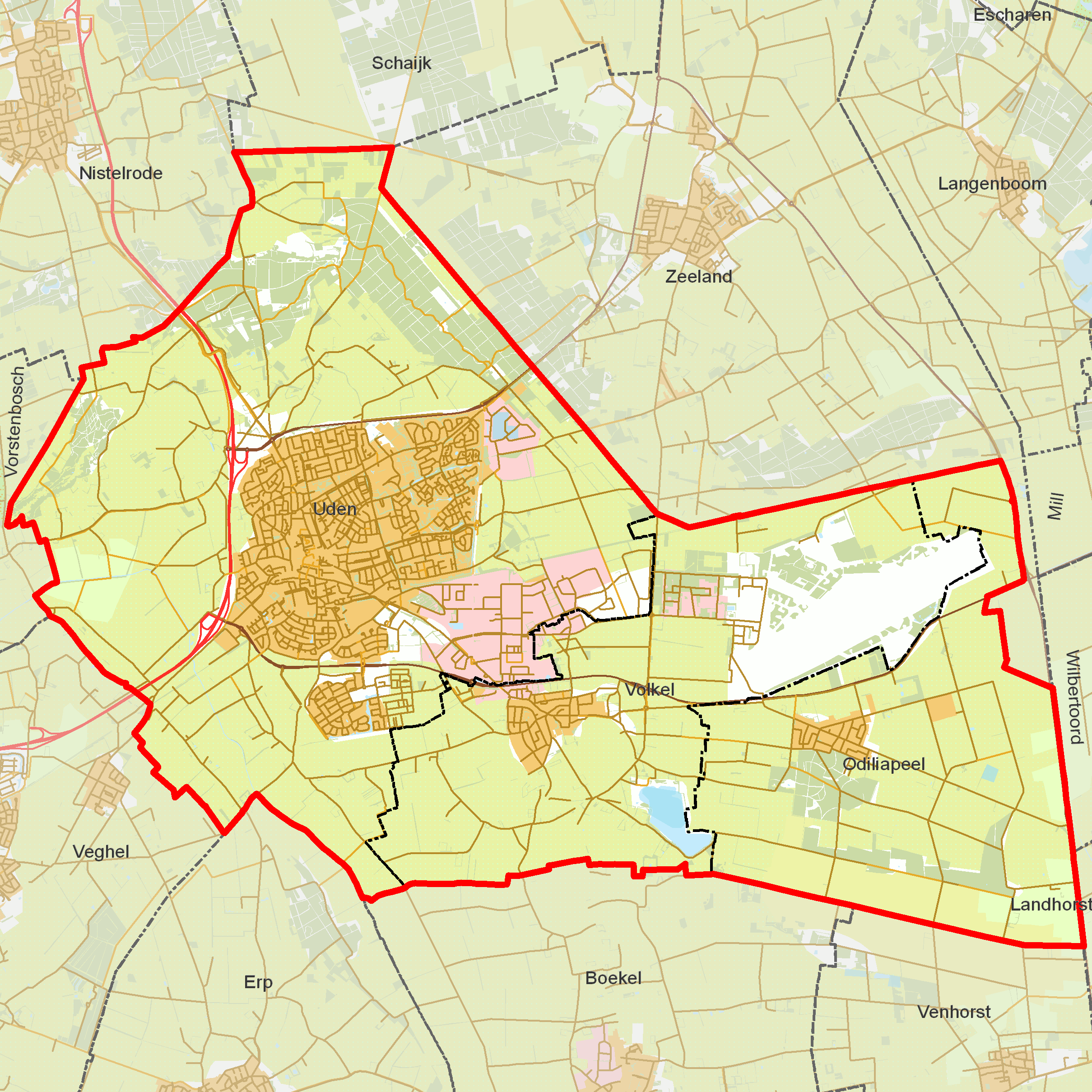 BAG woonplaatsen - Gemeente Uden.png